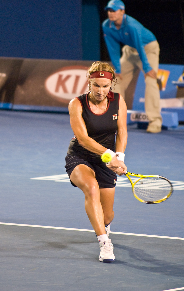 Svetlana Kuznetsova